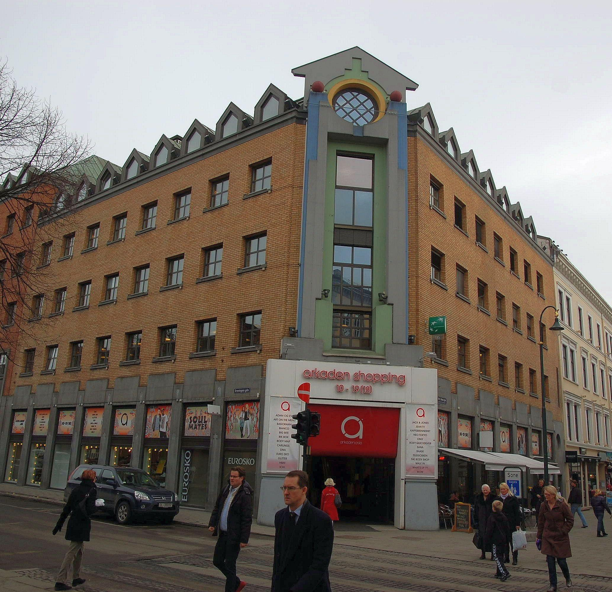 Arkaden shoppingsenter på Karl Johan i Oslo